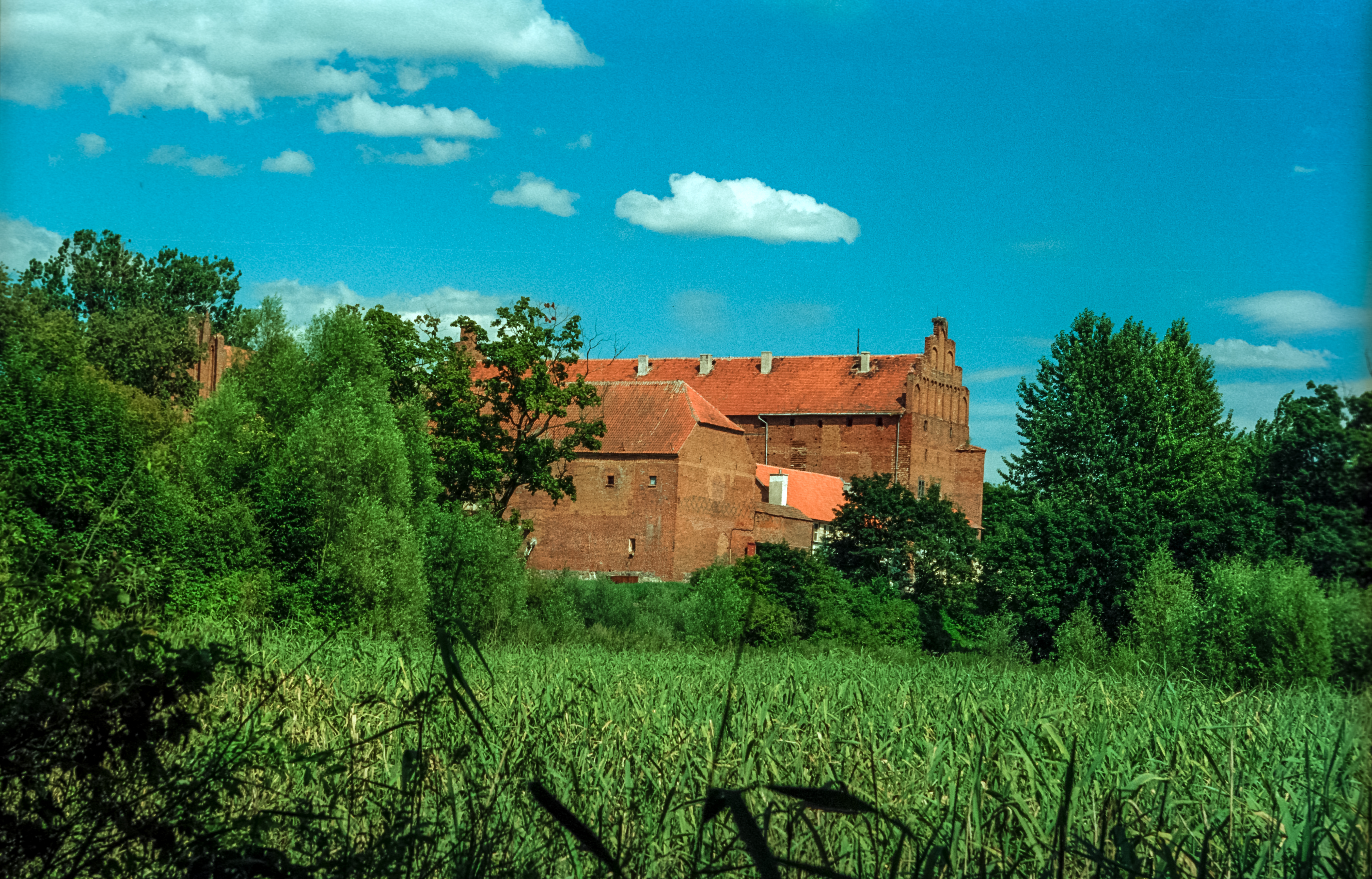 Barciany castle